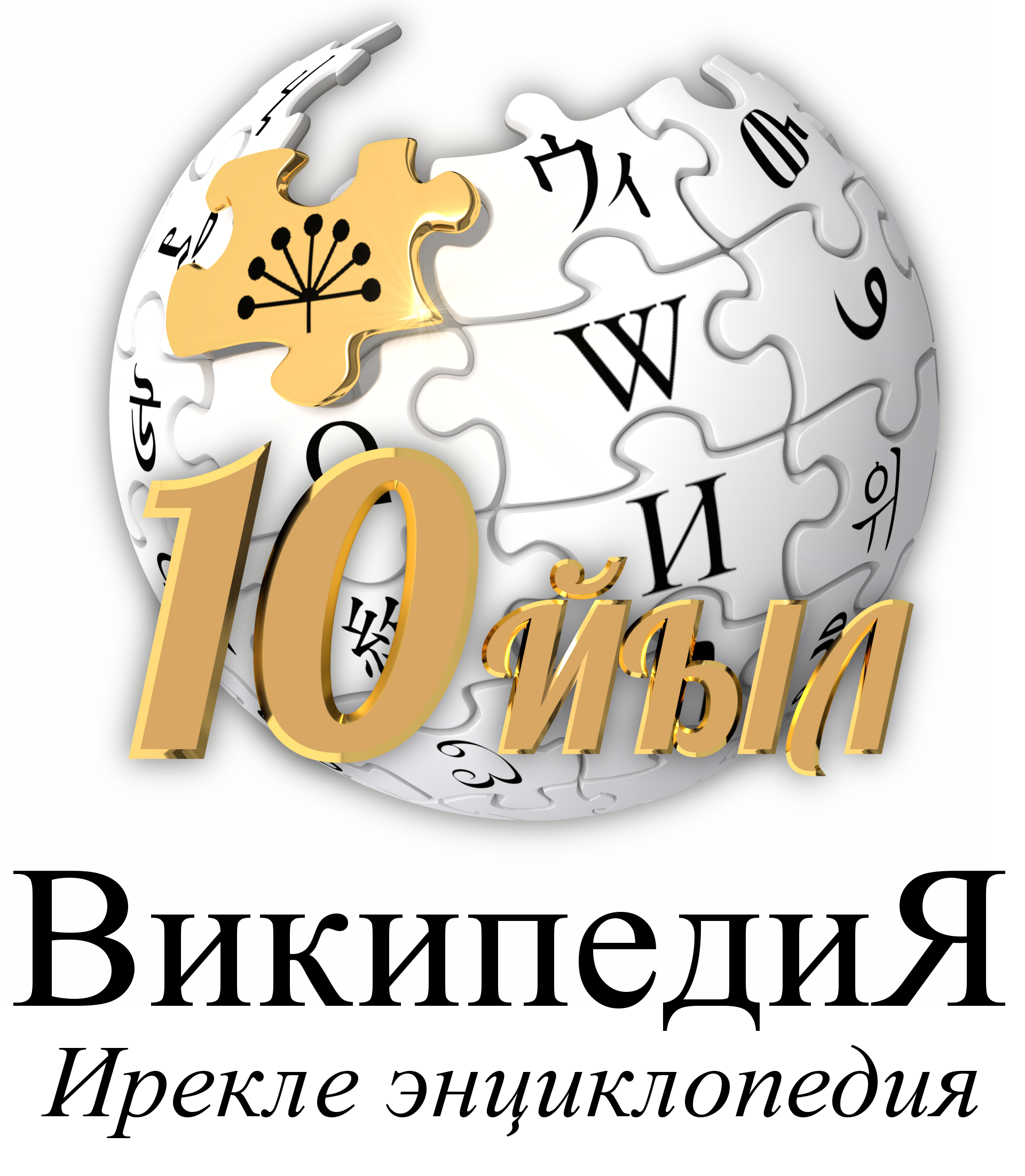 вар.51